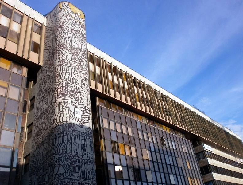 Mozaika na magistrátě v Ústí nad Labem - autor: Miroslav Houra